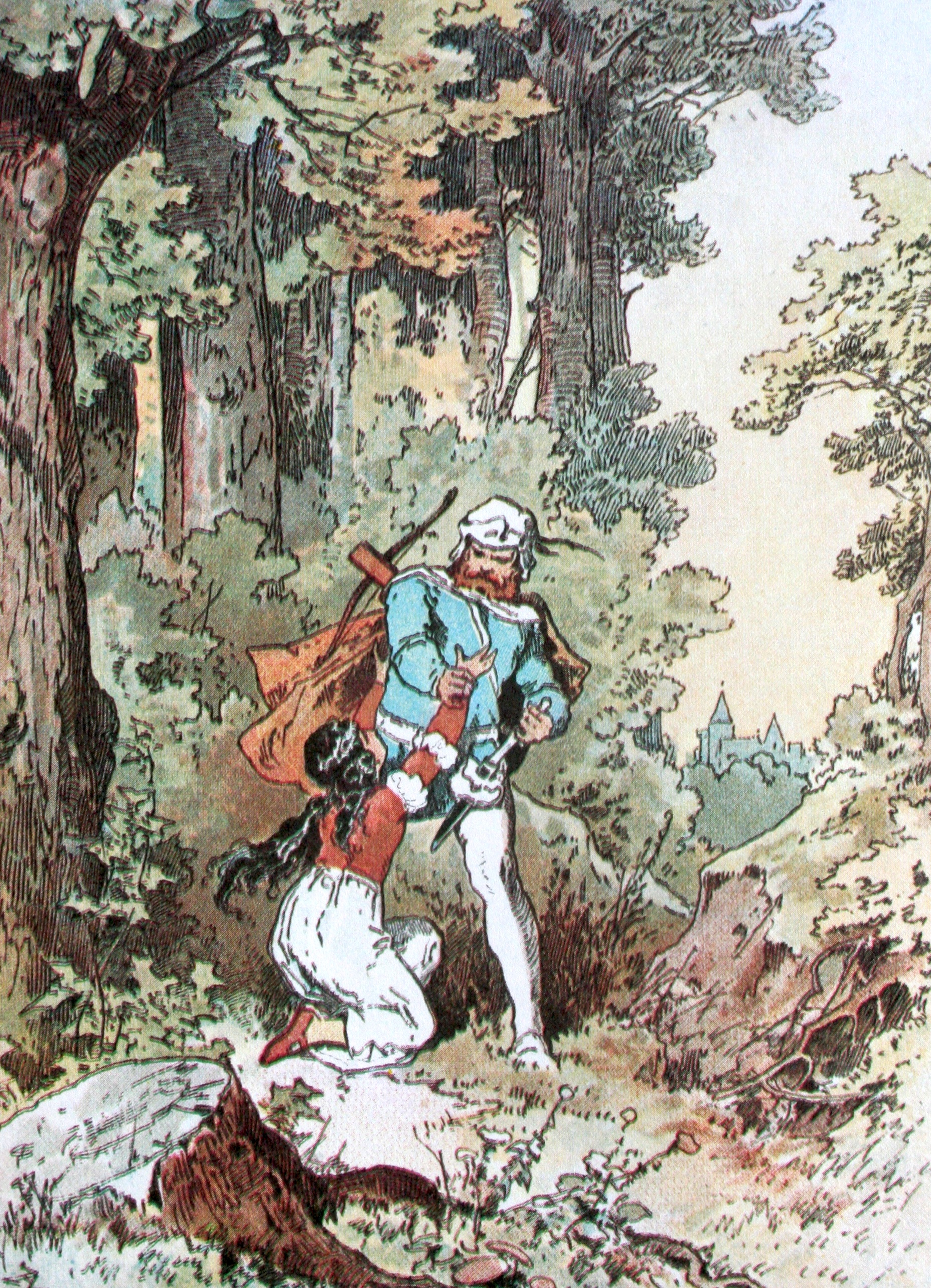 Schneewittchen; Darstellung von Alexander Zick (1845 - 1907)